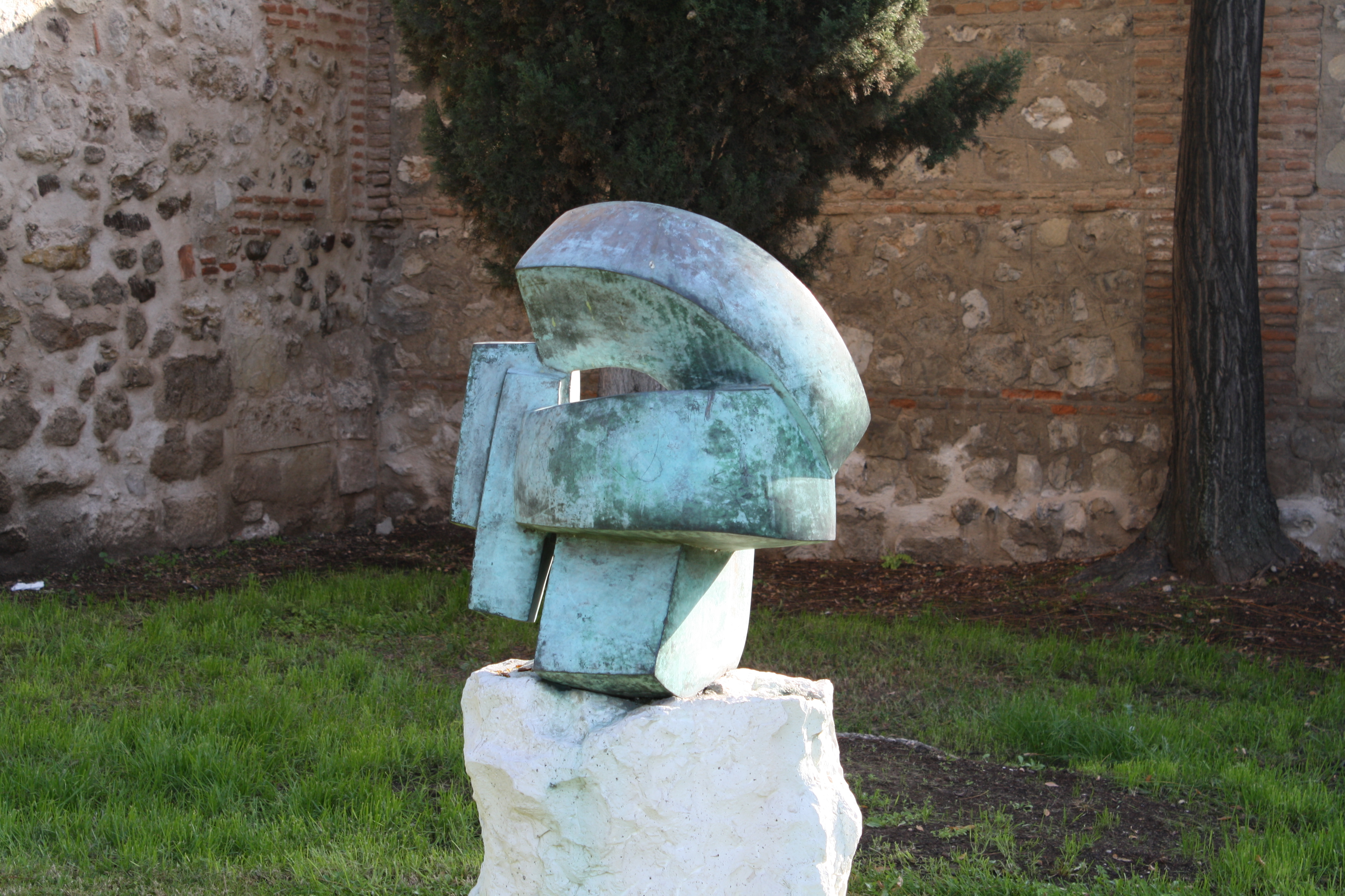 Museo de escultura al aire libre. Alcalá de Henares. Comunidad de Madrid. España - Spain.